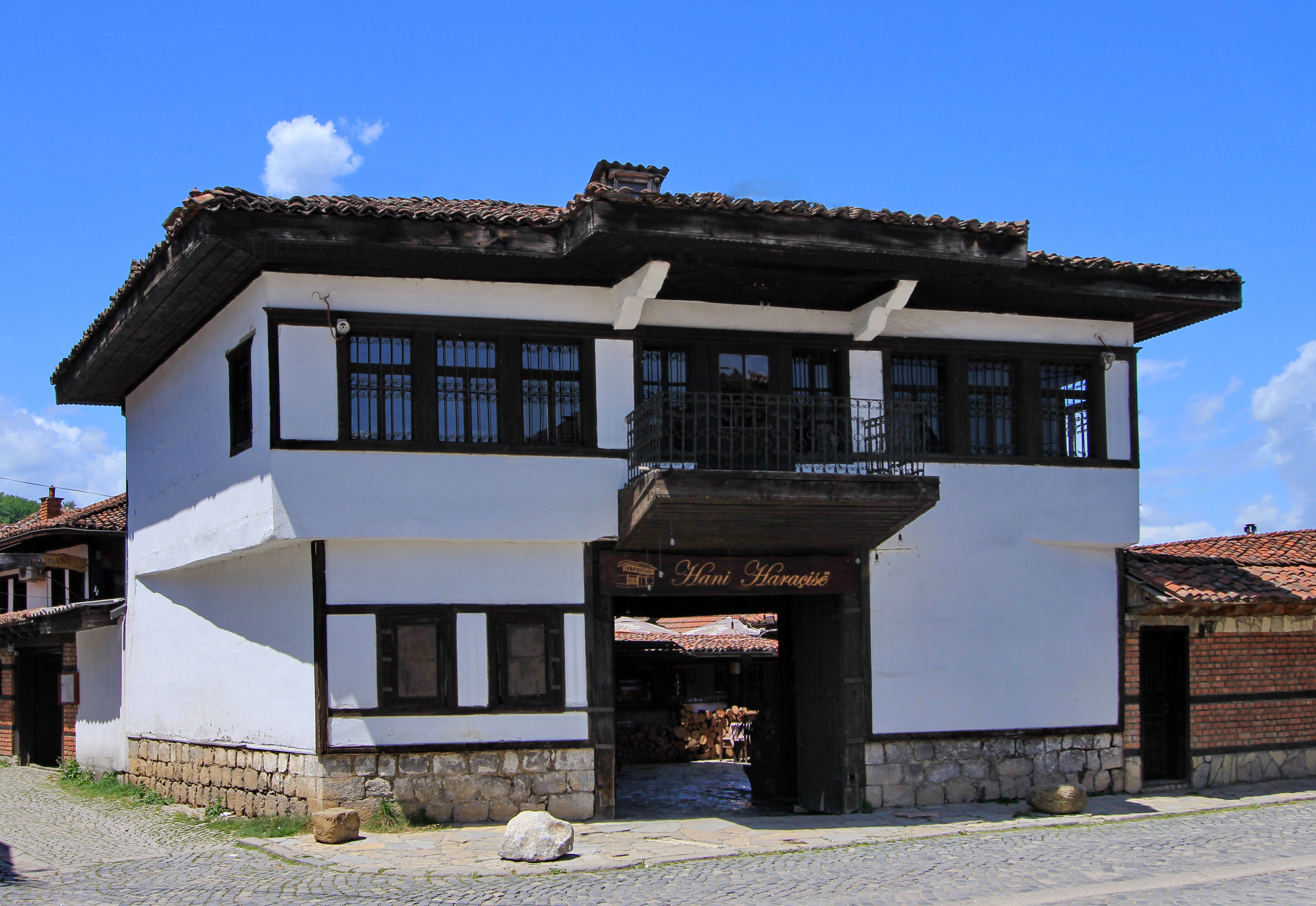 Kompleksi “Hani i Haraqisë”